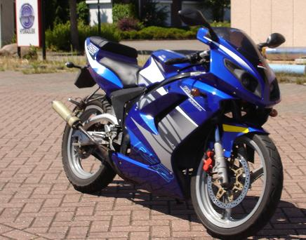 Voor artikel over schakelbrommers.